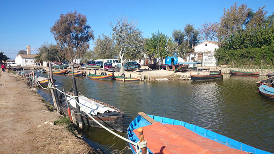 Puerto en la Actualidad